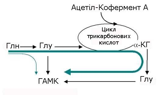 Гамма-аміномасляна кислота